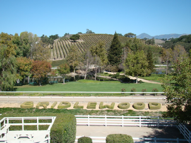 Wine tasting weekend.